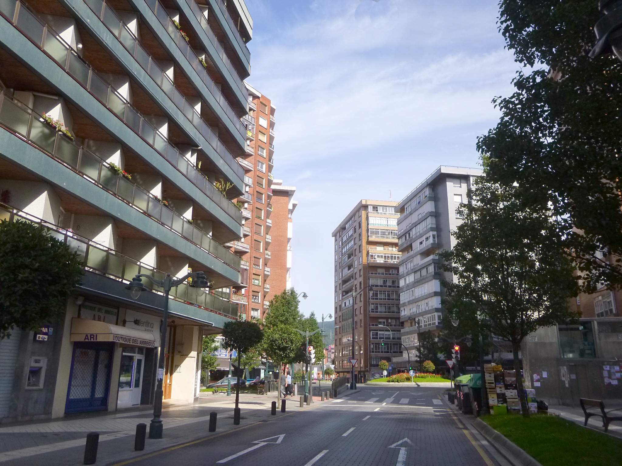 Bilbao - barrio de Santutxu